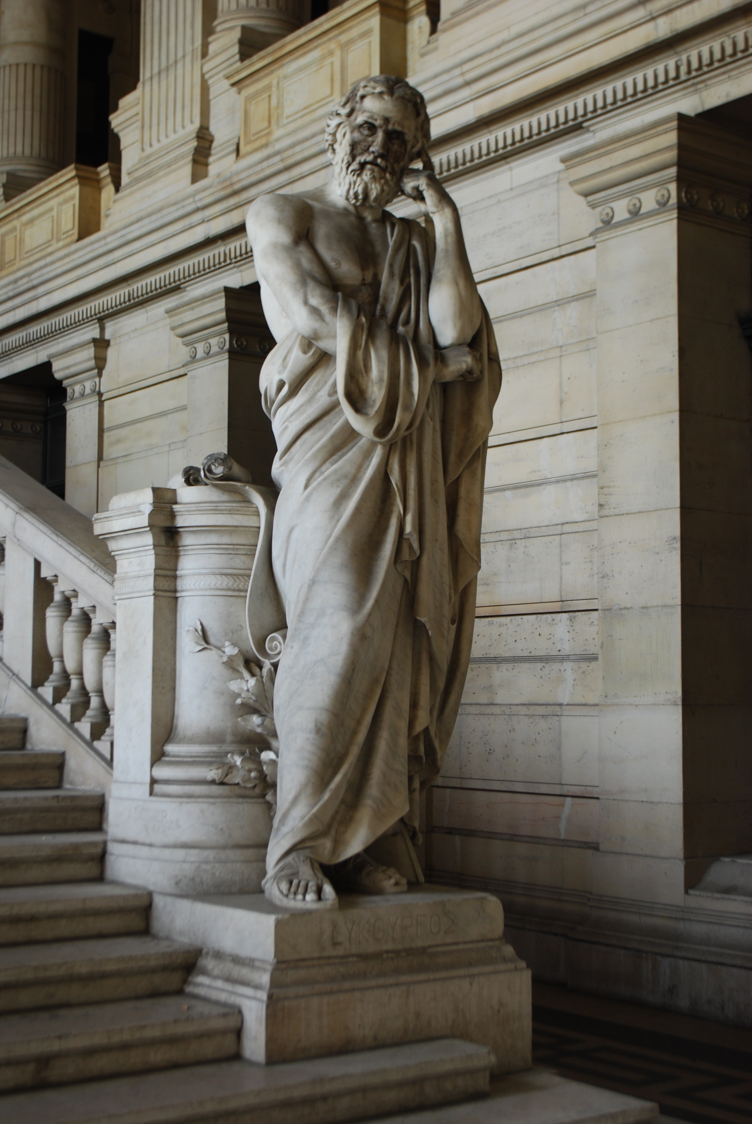 Statue de Lycurgue dans les galeries de façade du palais de Justice de Bruxelles.